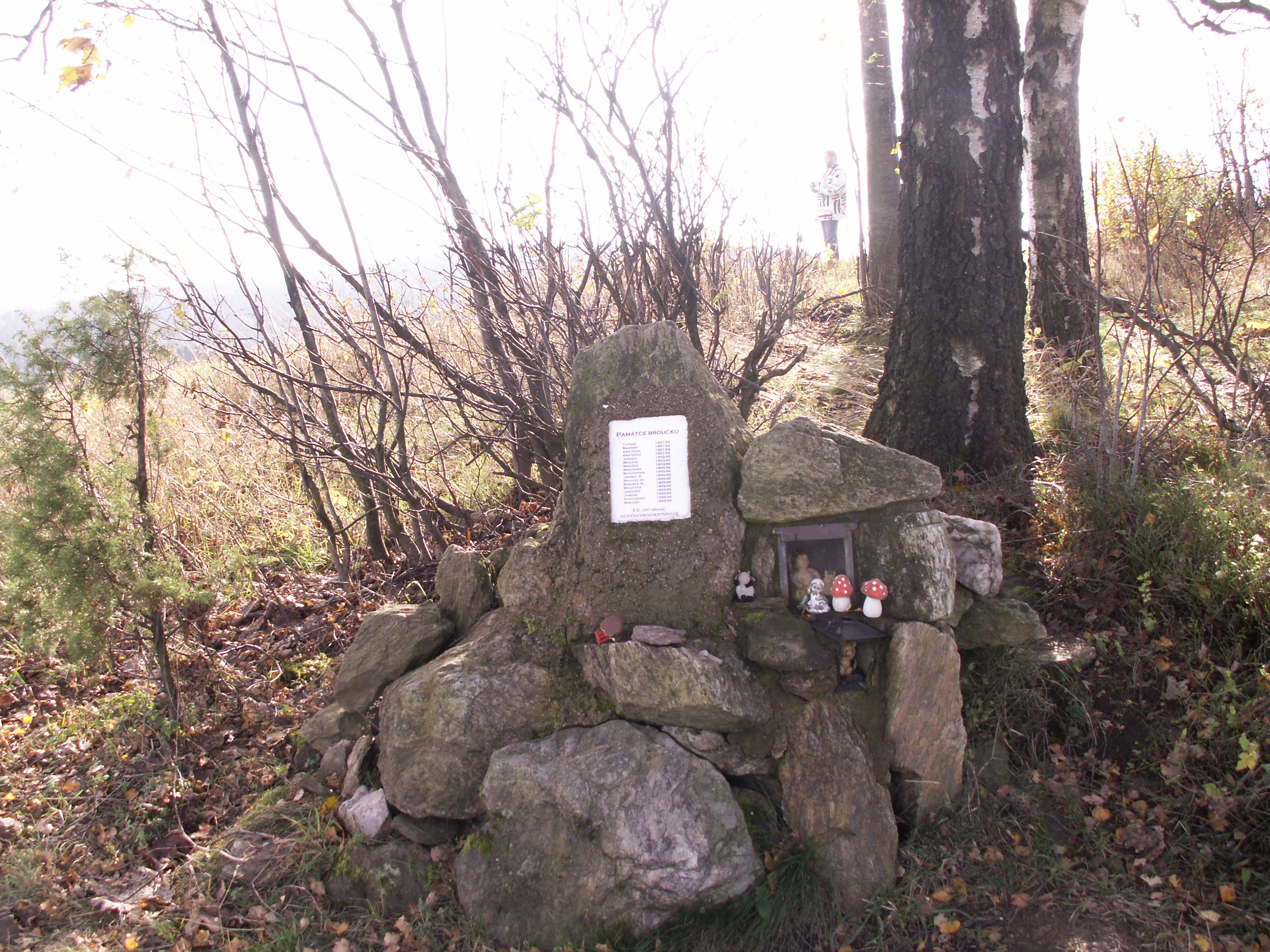 Roženecké Paseky, okres Žďár nad Sázavou, pomník broučků